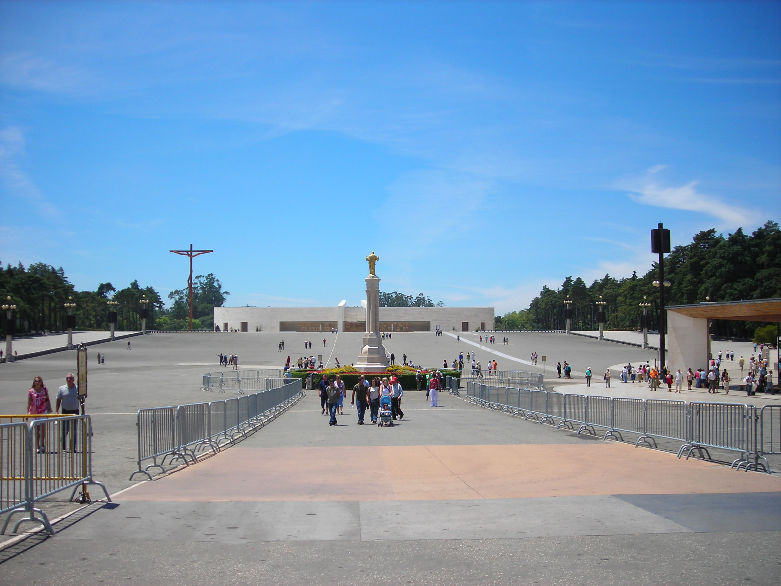 Santuário de Fátima